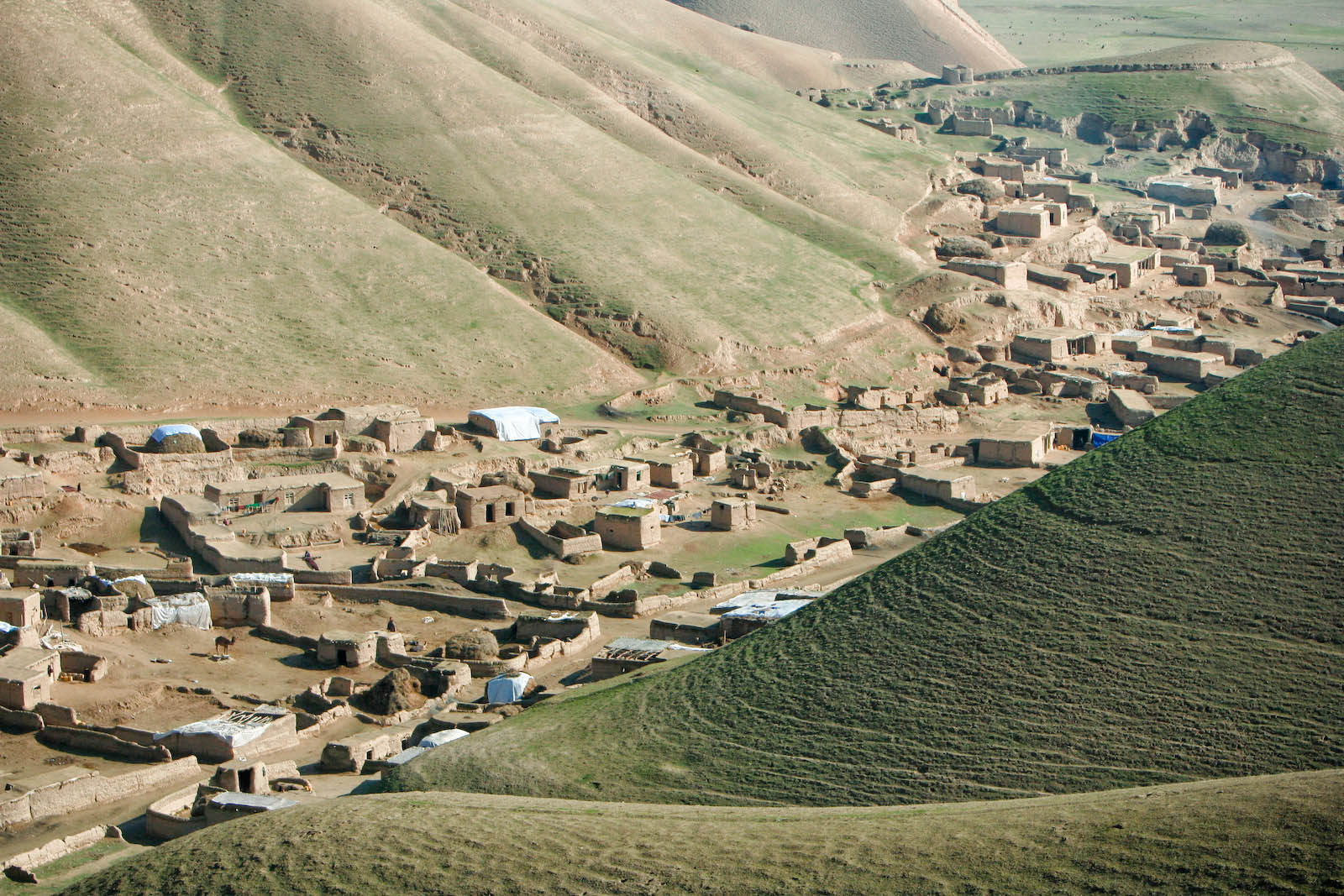 ファーリヤーブ州の村